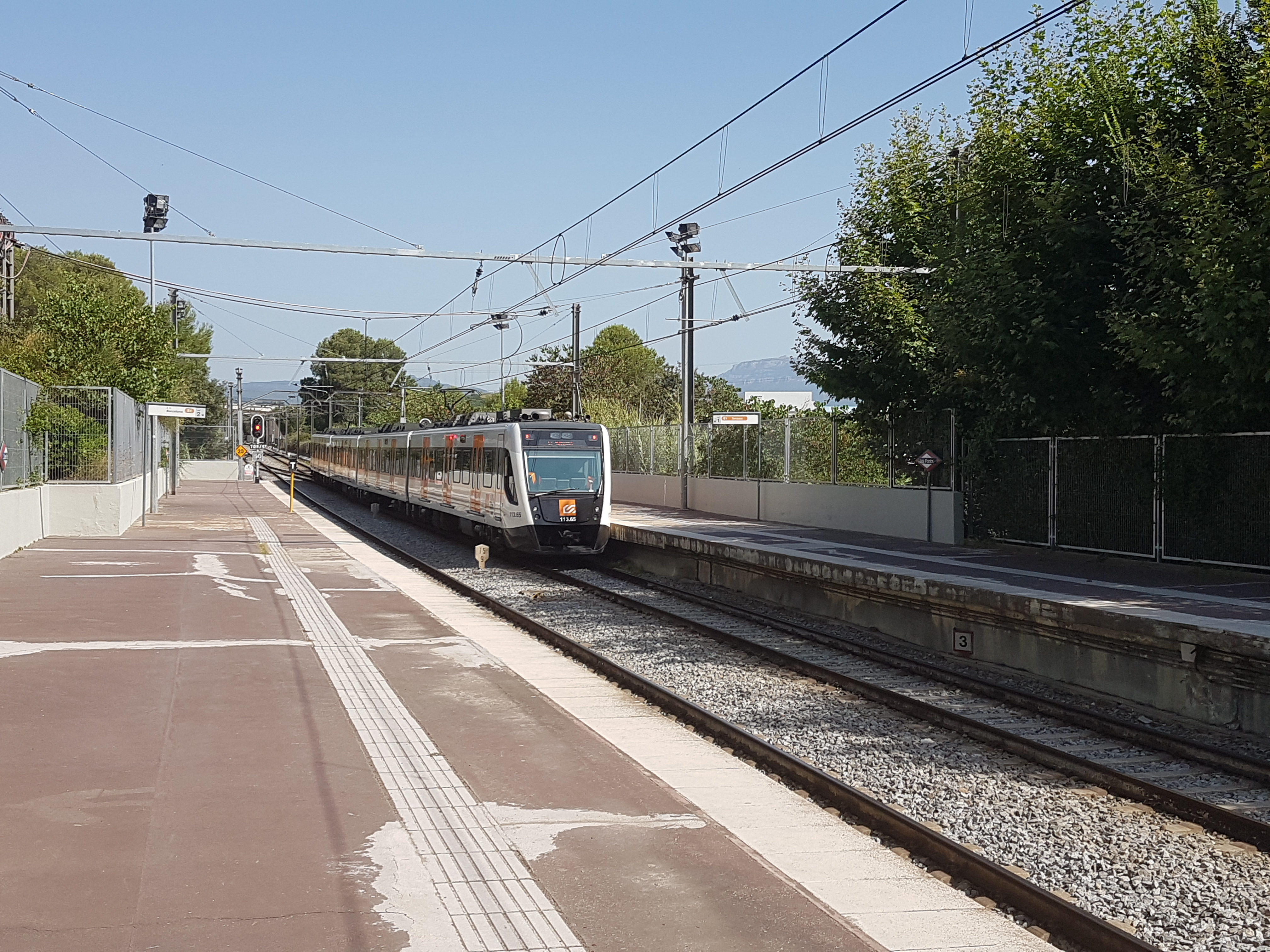 Unitat 113 a l'estació de Les Fonts amb servei S1 Terrassa Nacions Unides.